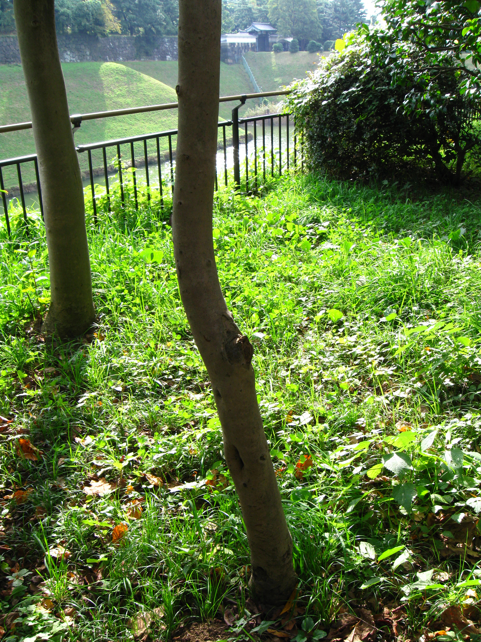 千鳥ヶ淵公園。 Canon PowerShot A590 IS